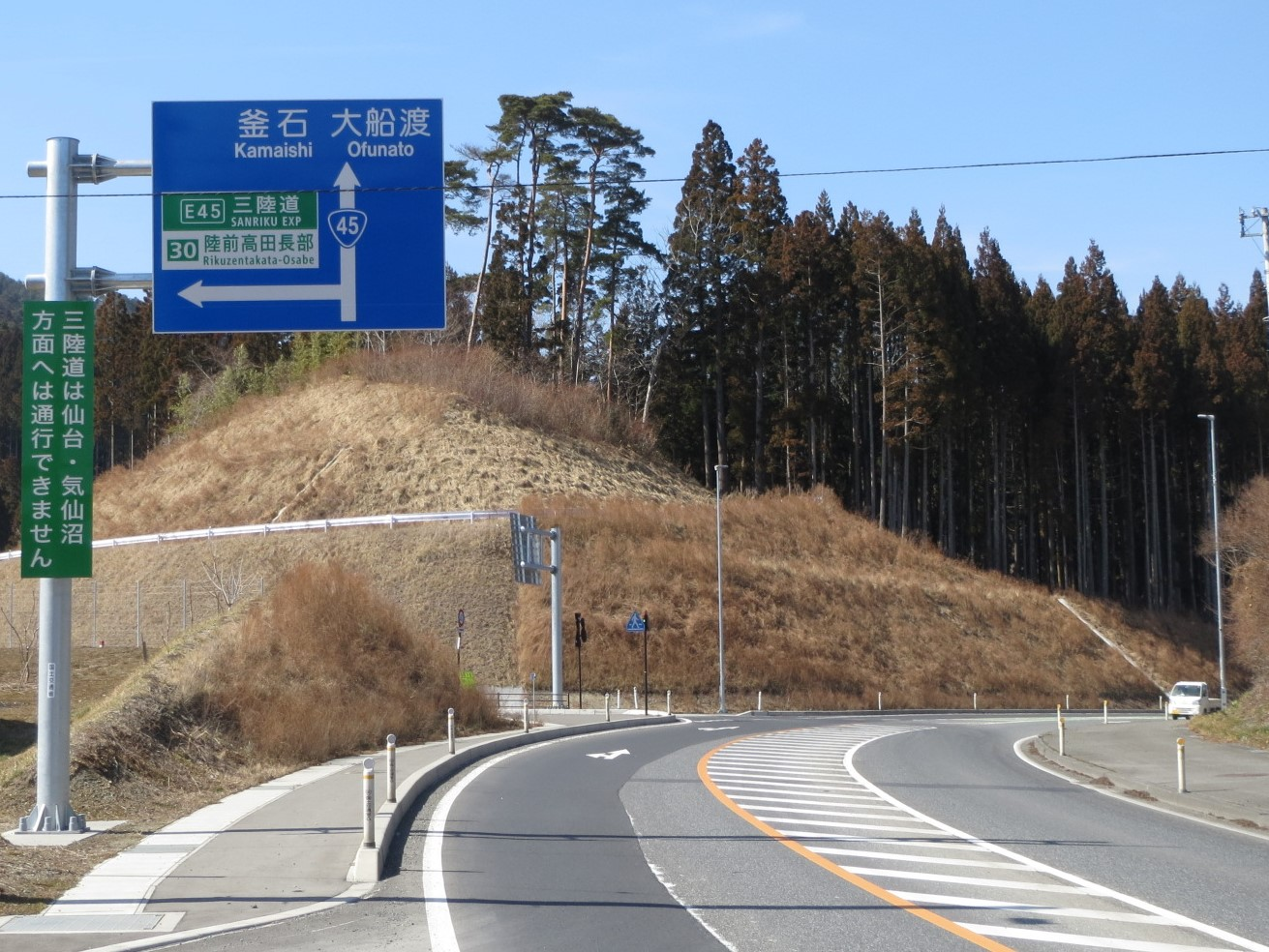 陸前高田長部インターチェンジ !Canon IXY 3